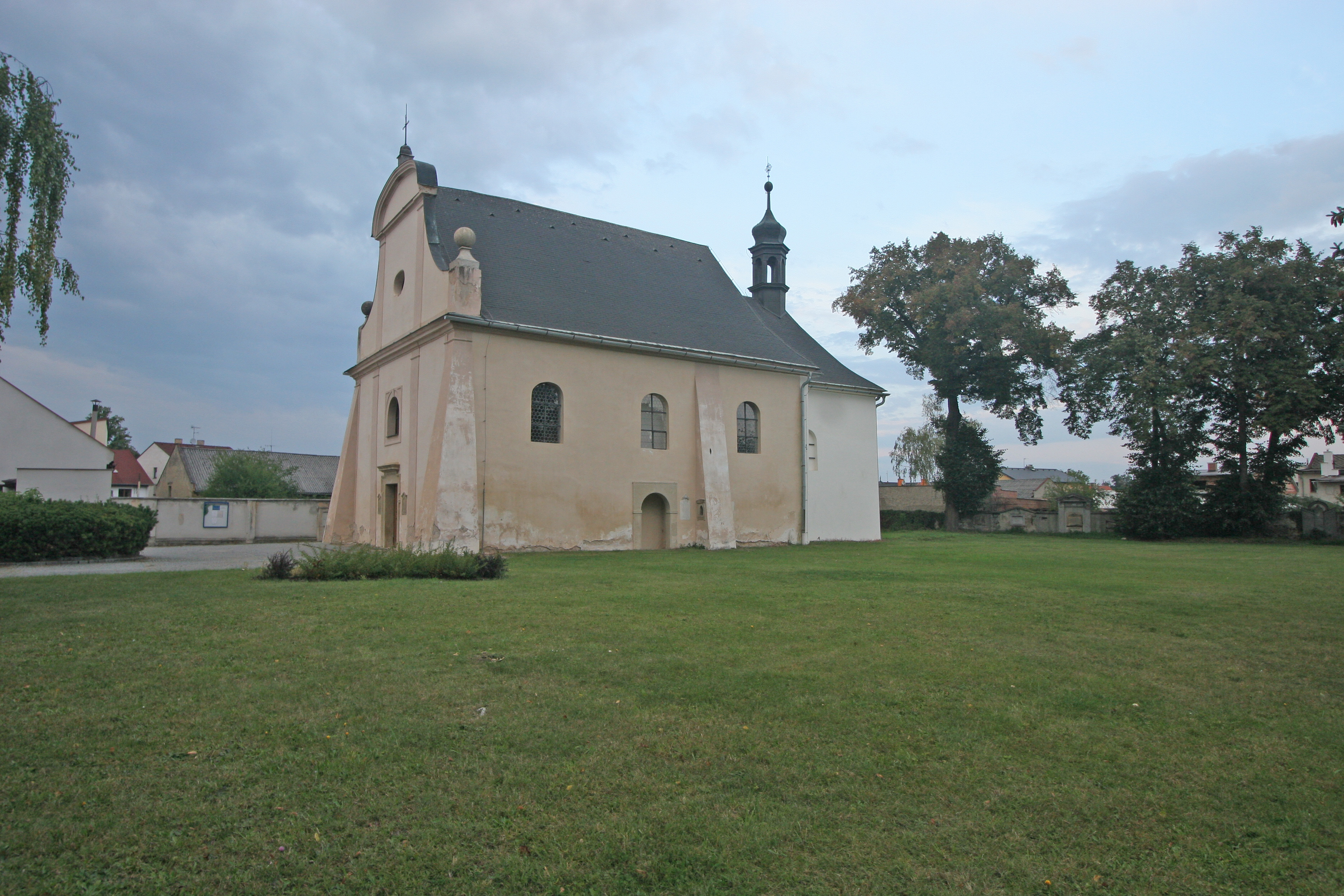 Kostel sv. Barbory (Bakov nad Jizerou), Boleslavská, Bakov nad Jizerou